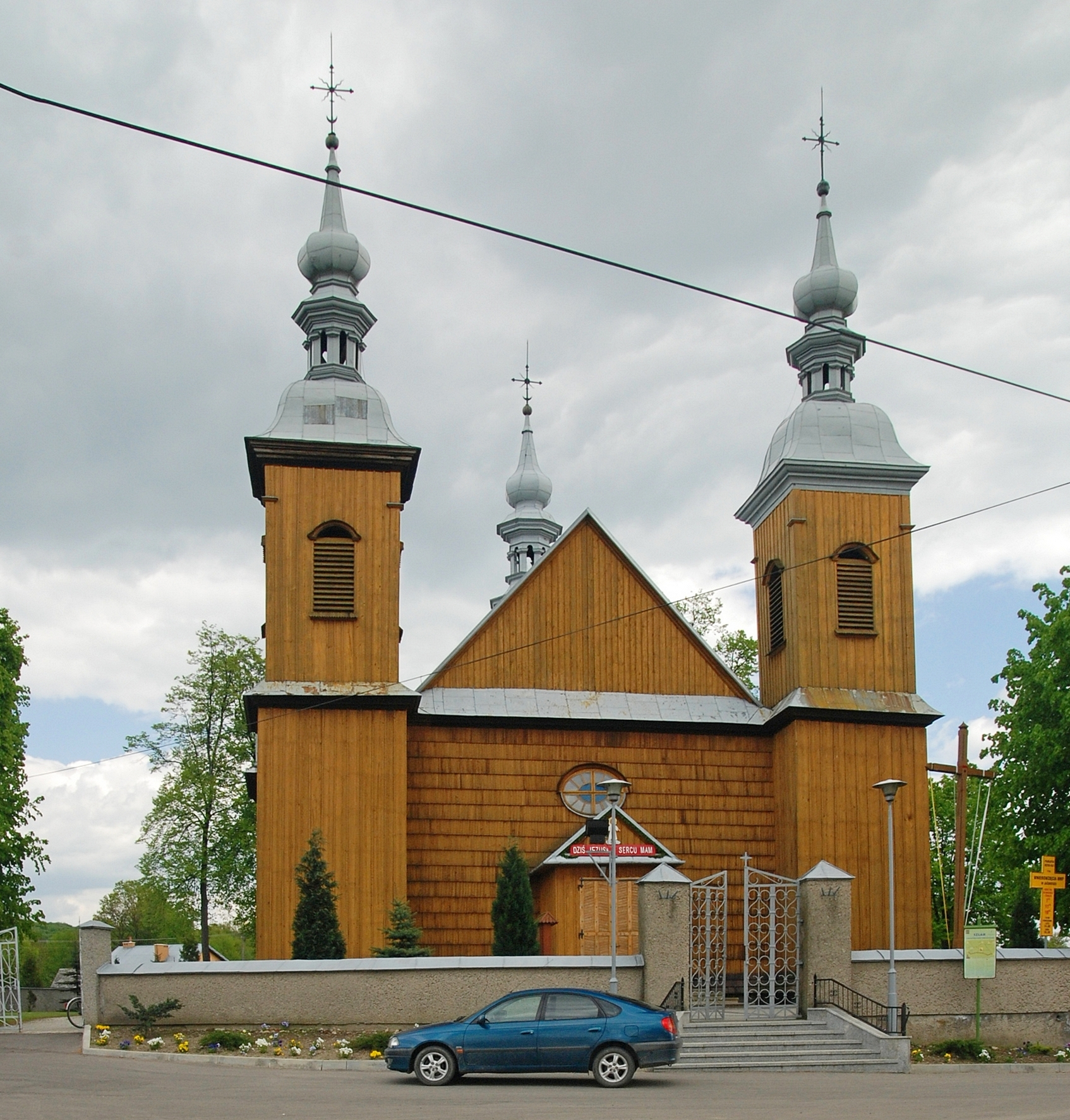 wieś Jaćmierz